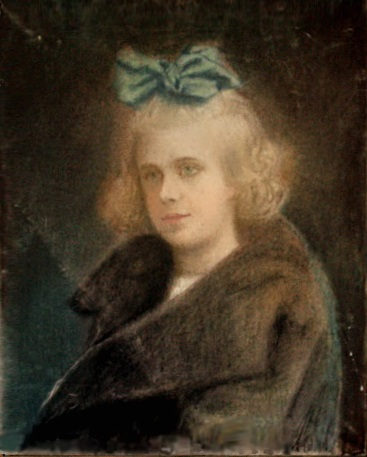 Портрет Эльжбеты Радзивилл неизвестного художника, 1920-е годы